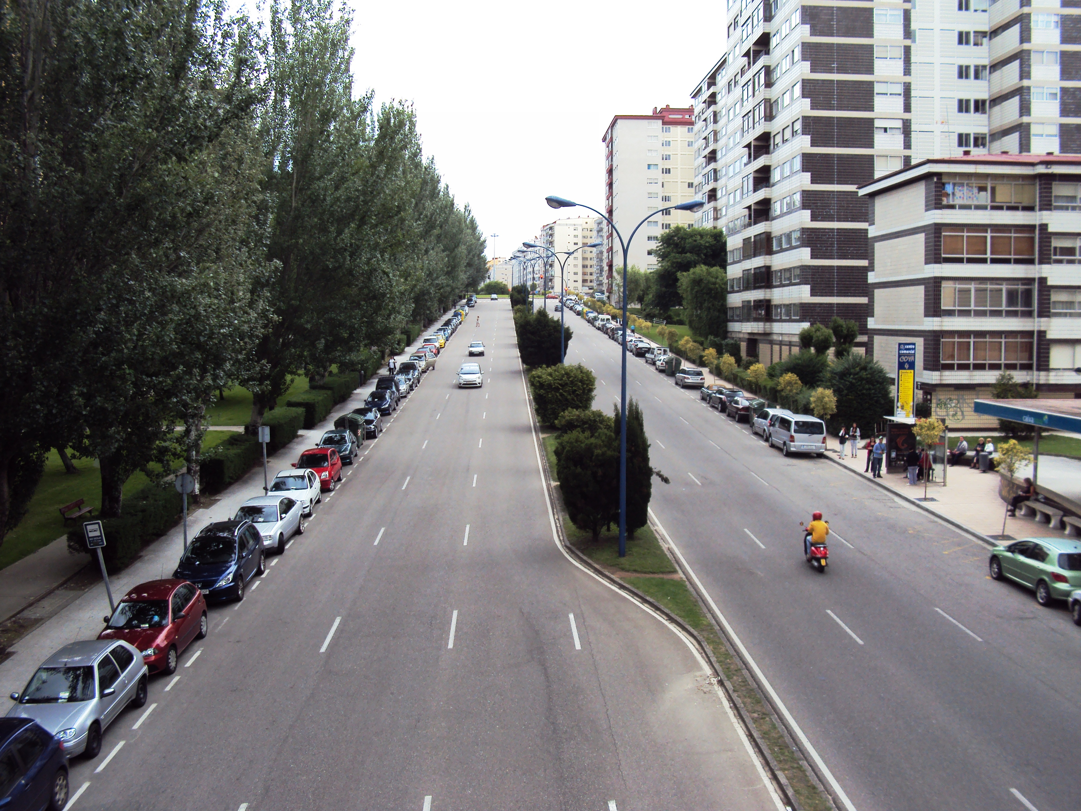 Avenida de Castelao en Coia, Vigo